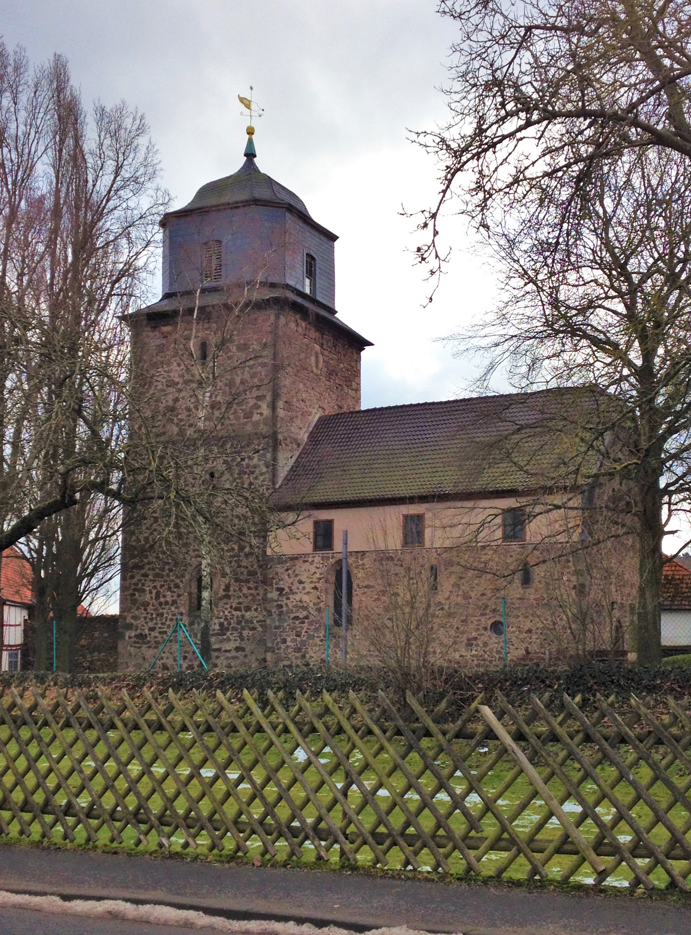 Neumorschen Kirche Seitansicht von Binsförther Straße aus